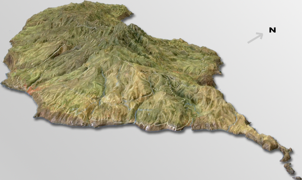 Visão tridimensional da ponta Este da Ilha da Madeira